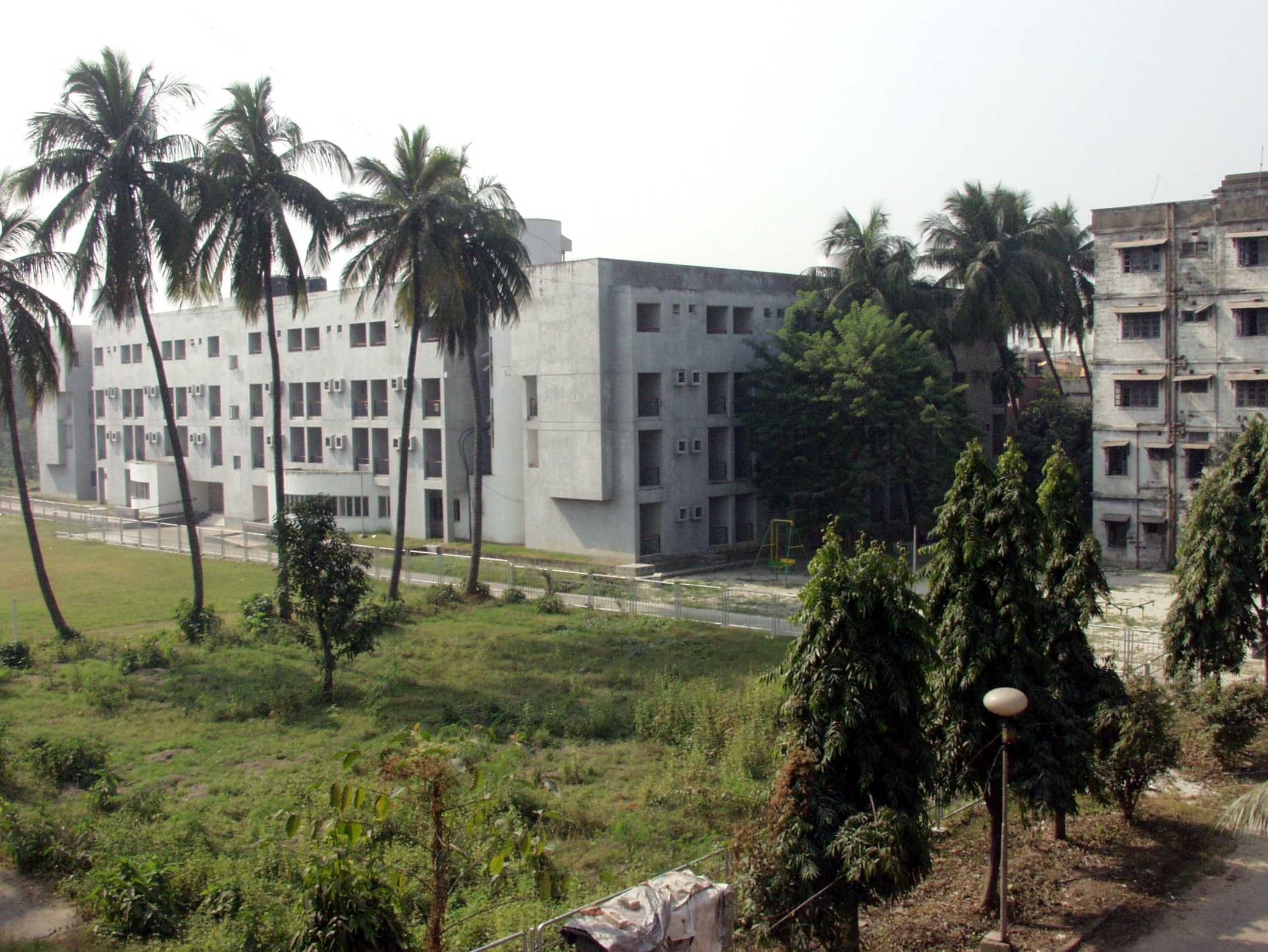 ISI University campus, Kolkata, India